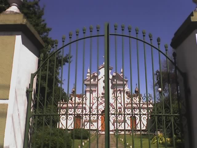 Parroquia María Auxiliadora, de la Obra Don Bosco, Ramos Mejía.